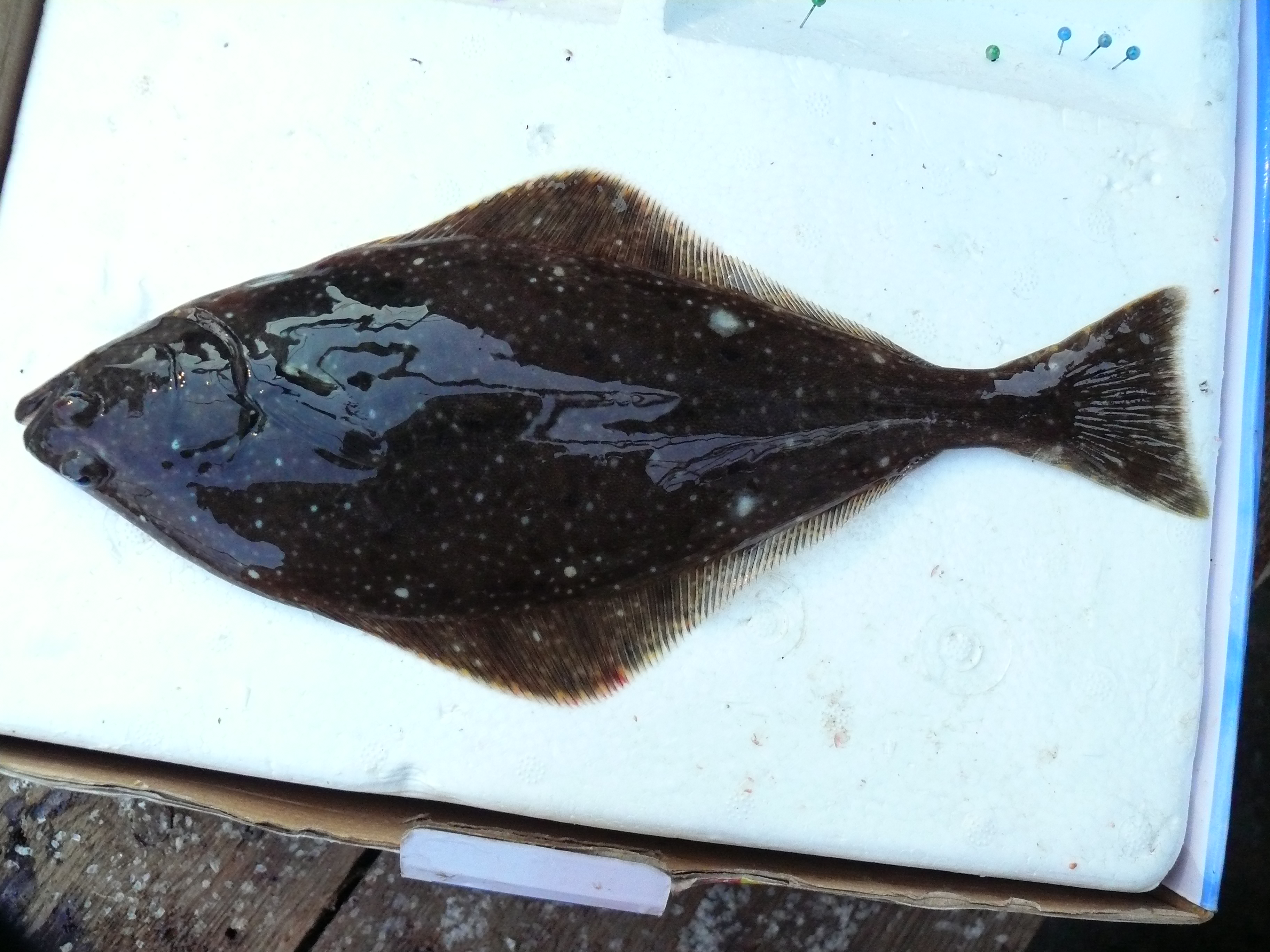 Неполовозрелый белокорый палтус северных Курильских островов. Зрячая сторона